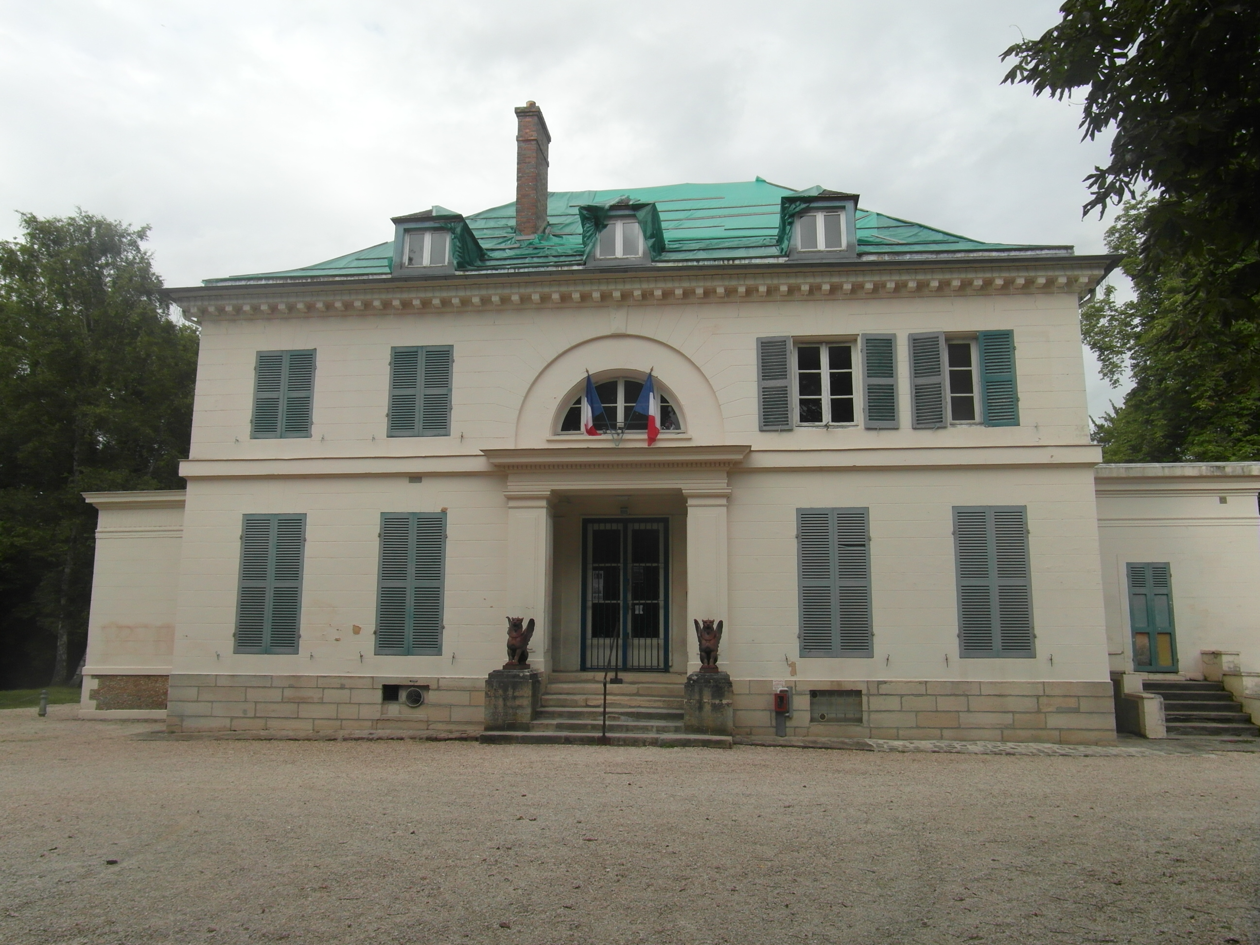 Mairie de Seine-Port (Seine-et-Marne)